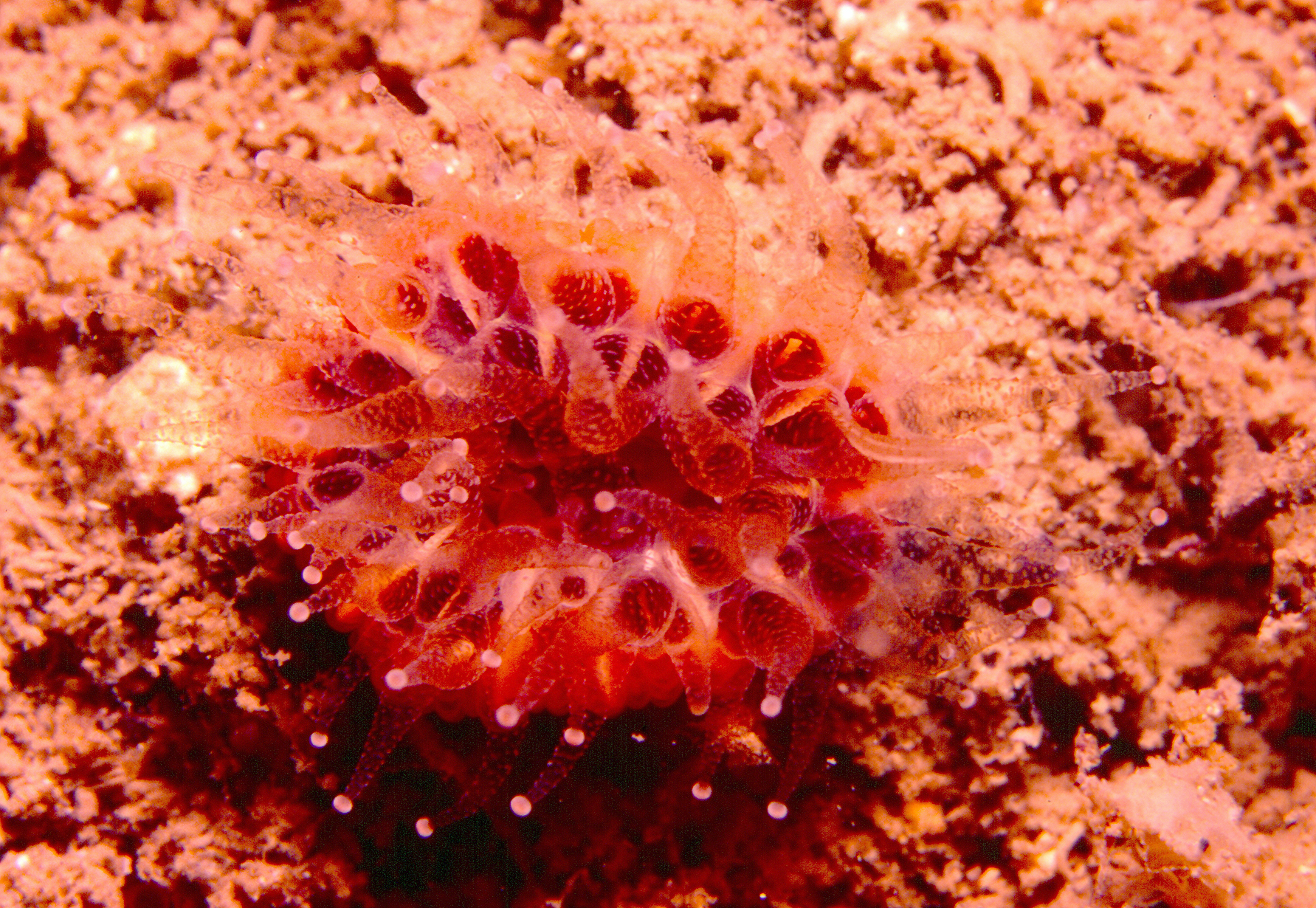 Caryophyllia smithii - Banyuls-sur-Mer : 07/93